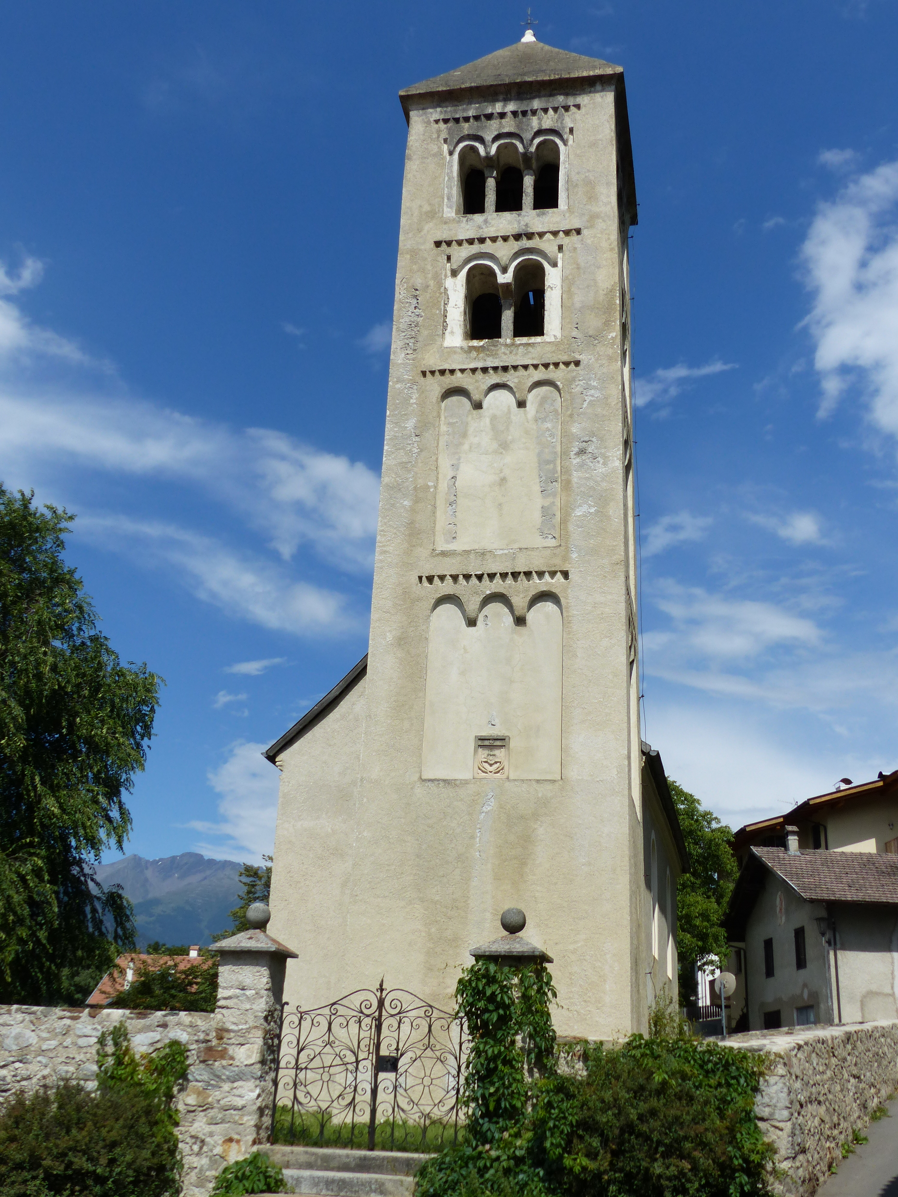 Kirchturm von St. Karpophorus in Tarsch